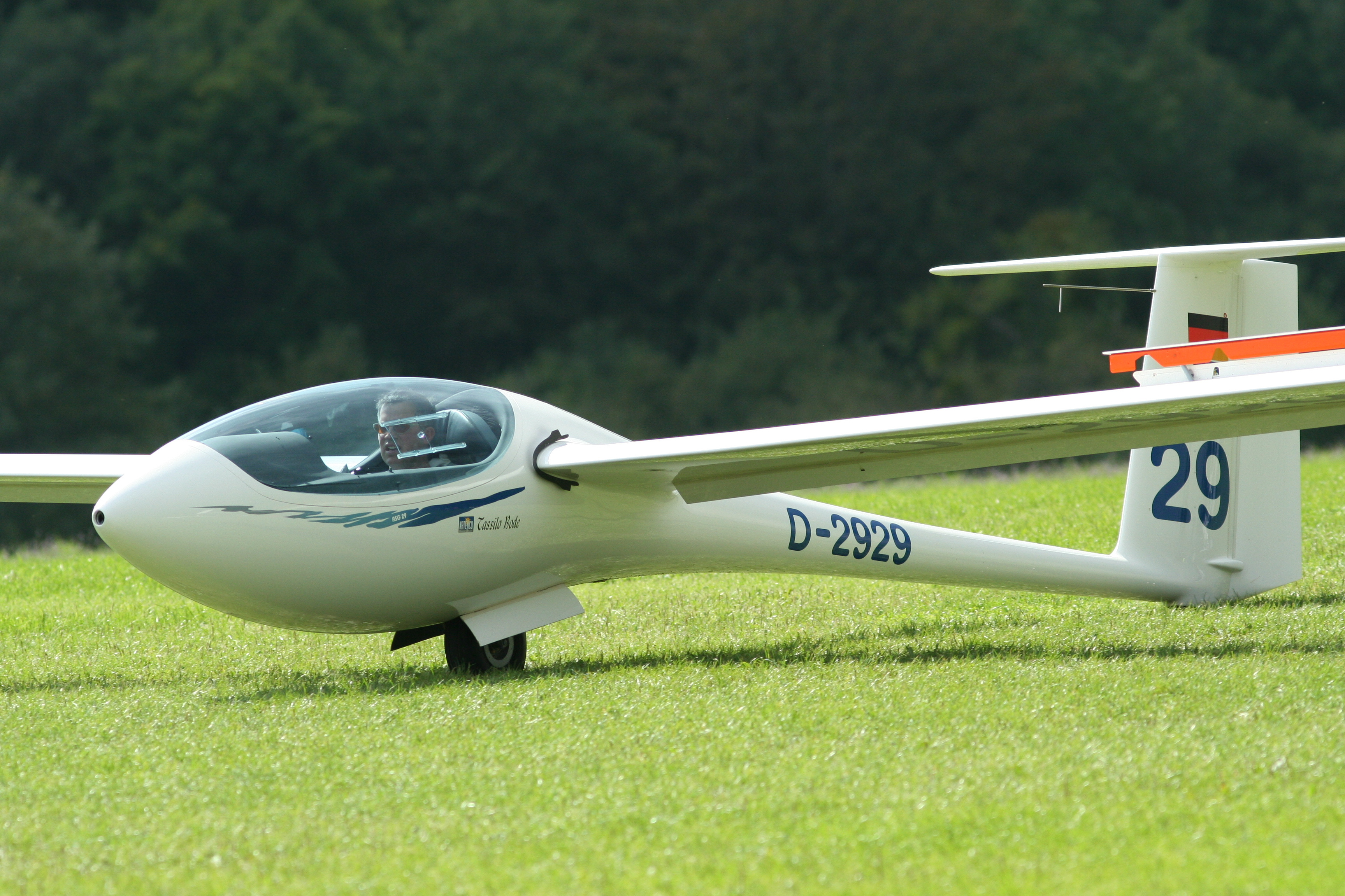 Flugzeug: Schleicher ASG 29 Pilot: Tassilo Bode Wo: Beim Gliding Grand Prix auf dem Flugplatz Hahnweide in Baden-Württemberg